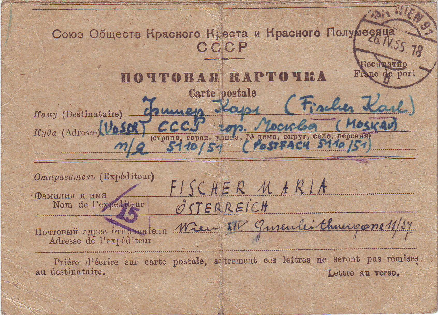 1. Schreiben Maria Fischers an Karl Fischer, 26. April 1955. Das Original des Schreibens befindet sich in Privatbesitz.